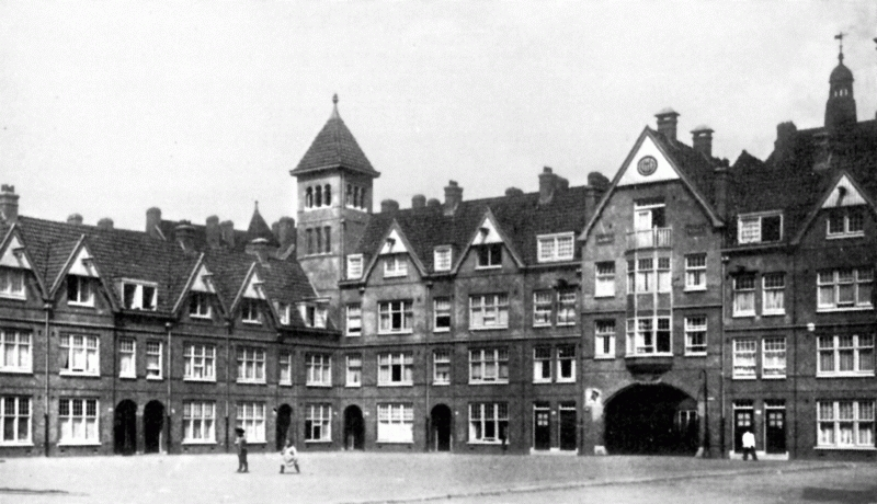 Zaanhof